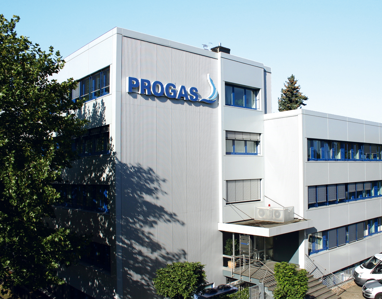 Das Foto zeigt die PROGAS-Hauptverwaltung in Dortmund.